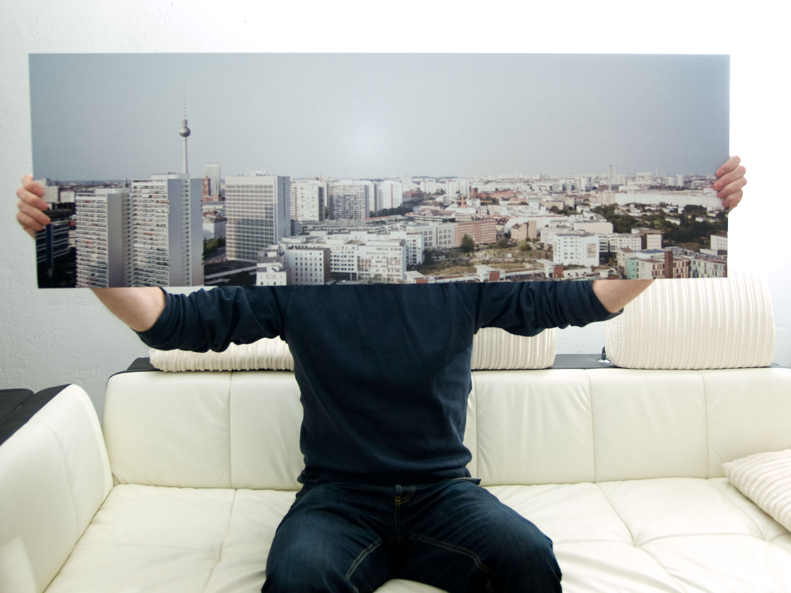 mein erster großer abzug: 120x40, alu-dibond